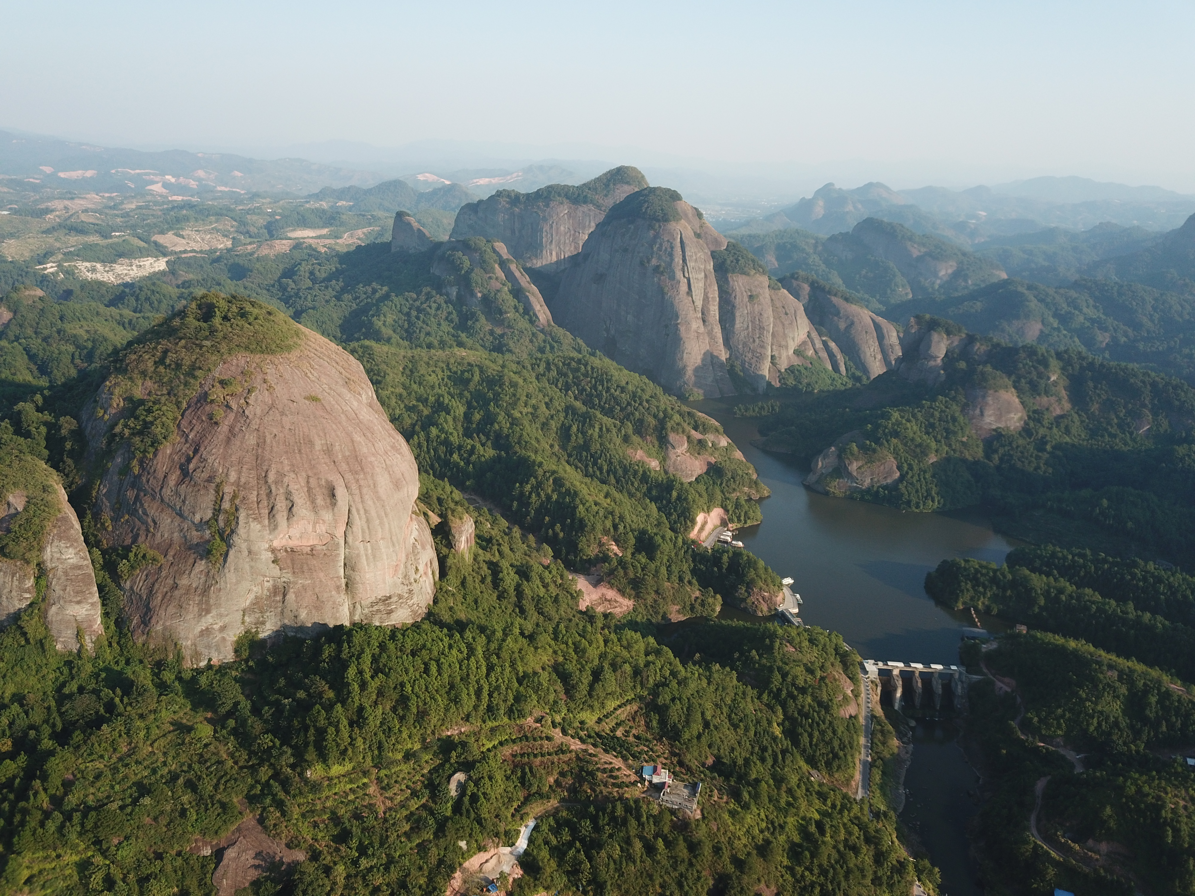 会昌汉仙岩